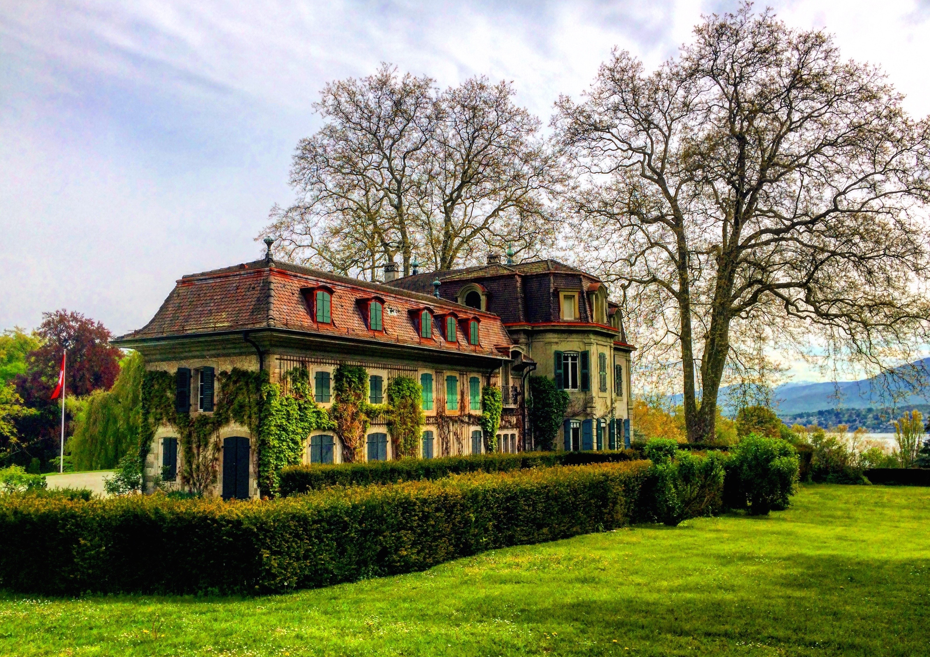 Le Château de Penthes abritant le musée des Suisses dans le monde à Pregny-Chambésy, village de la campagne genevoise.